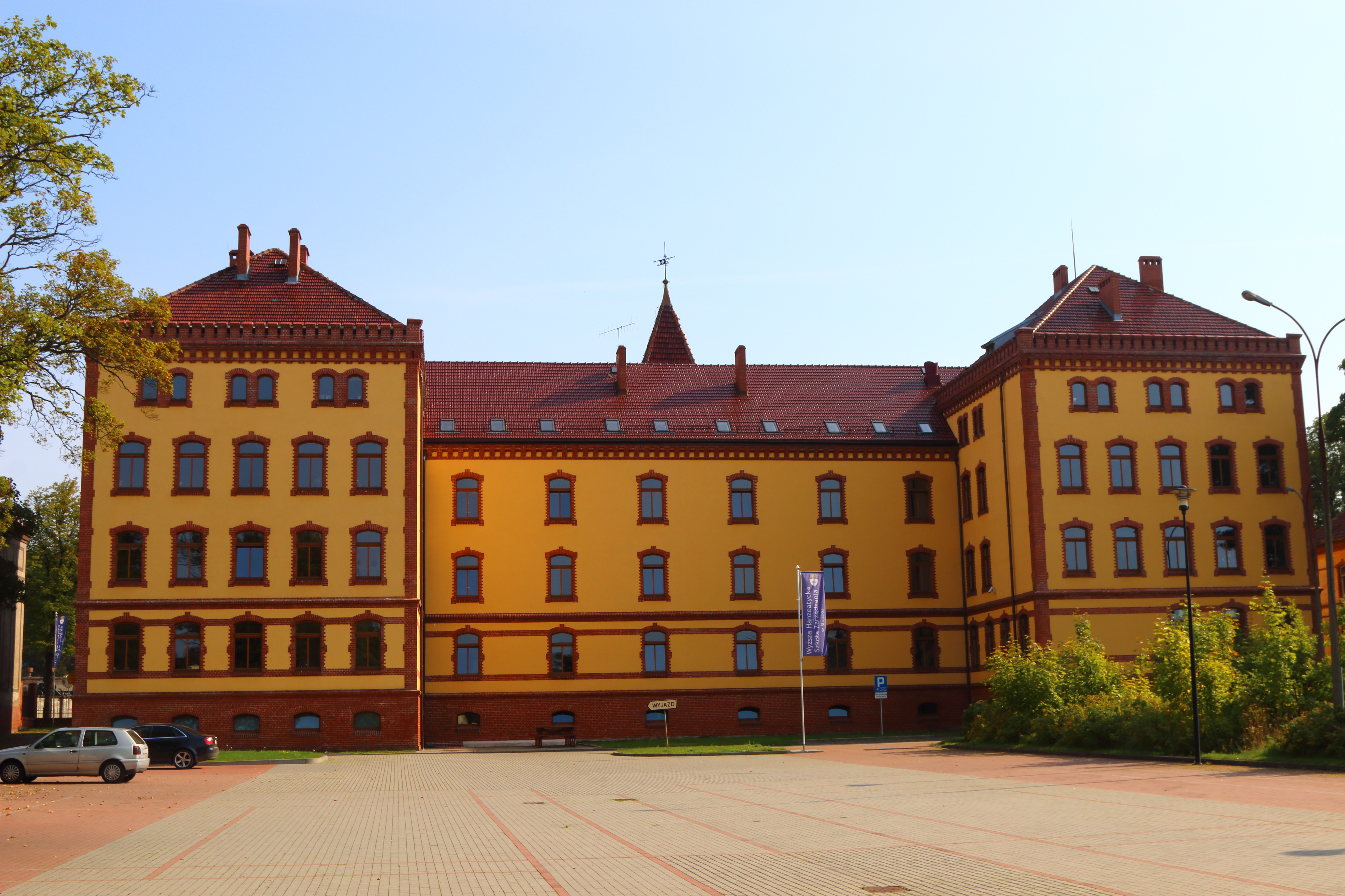 Słupsk, ul. Bohaterów Westerplatte 64 - zespół dawnych koszar Regimentu Huzarów, elewacja północna